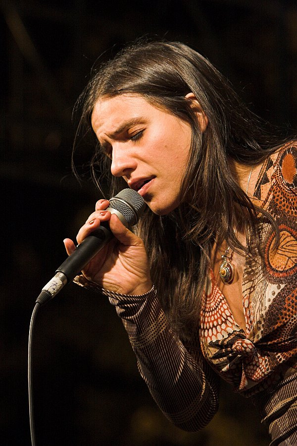 Palya Bea